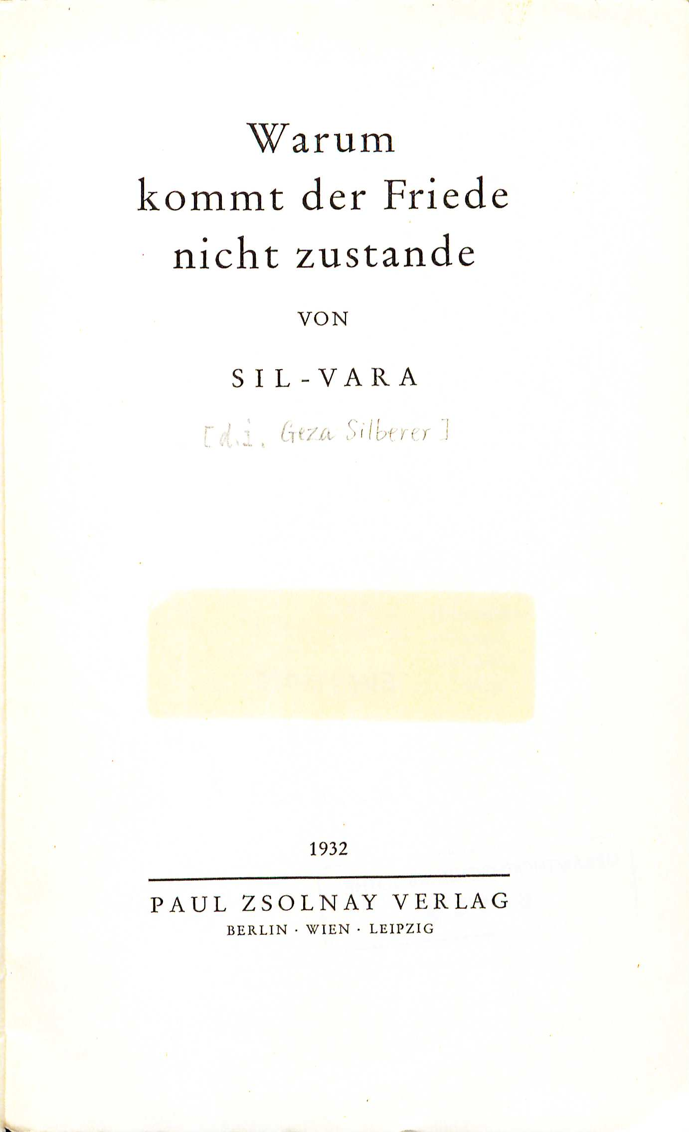 Sil-Vara: Warum kommt der Friede nicht zustande, Berlin : Zsolnay, 1932